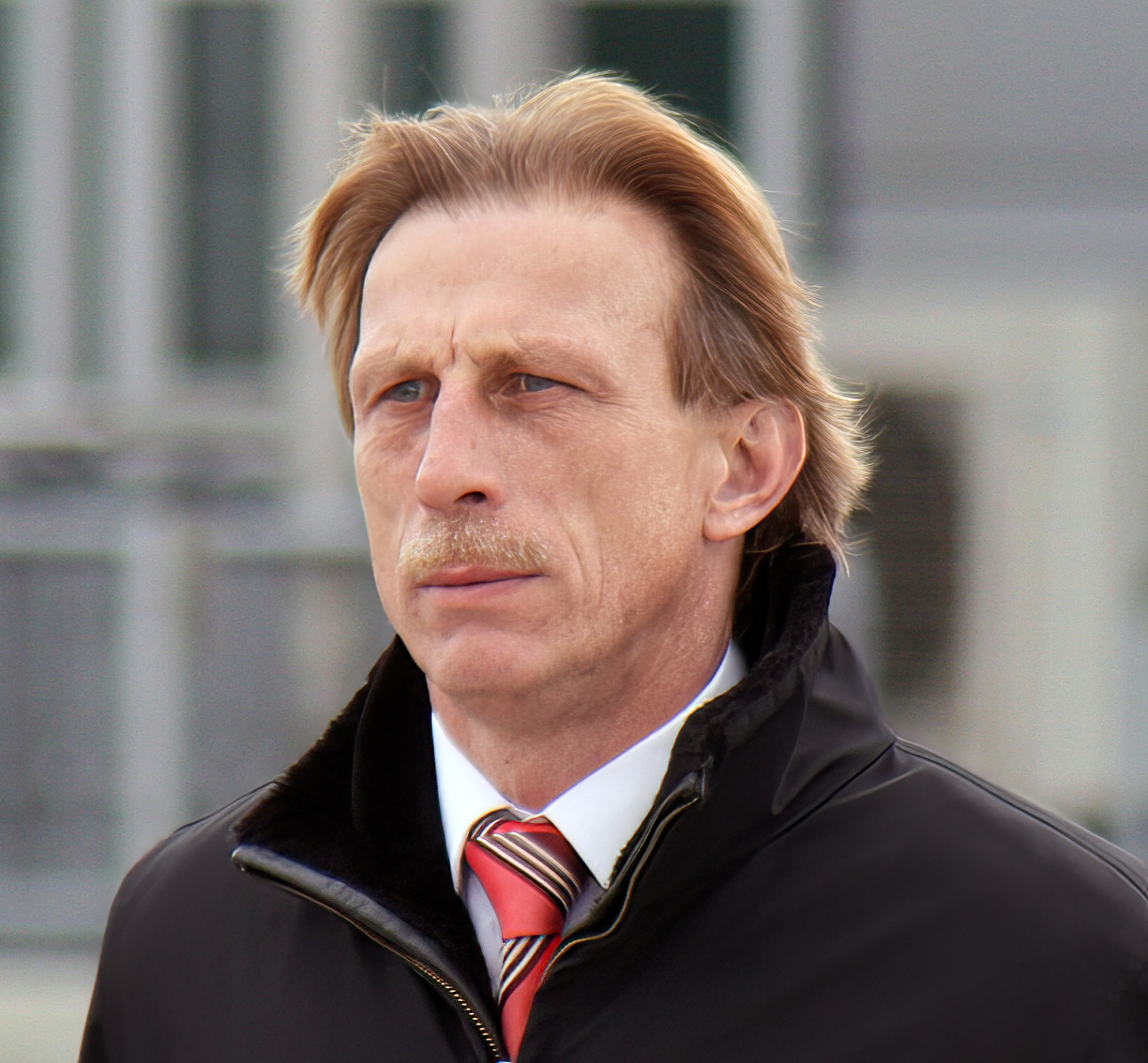 Christoph Daum, aufgenommen am Flughafen Schönefeld